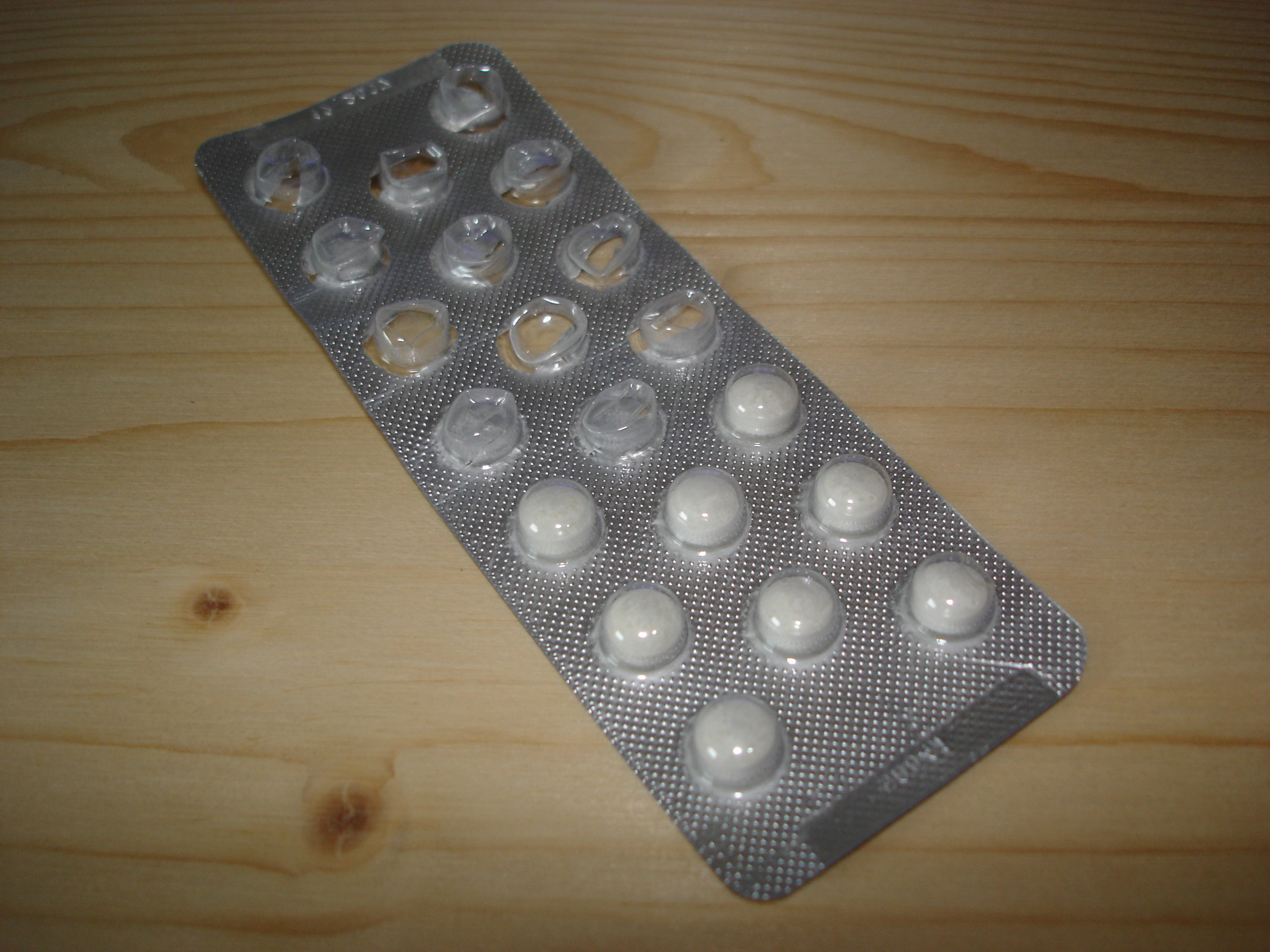 Tabletten